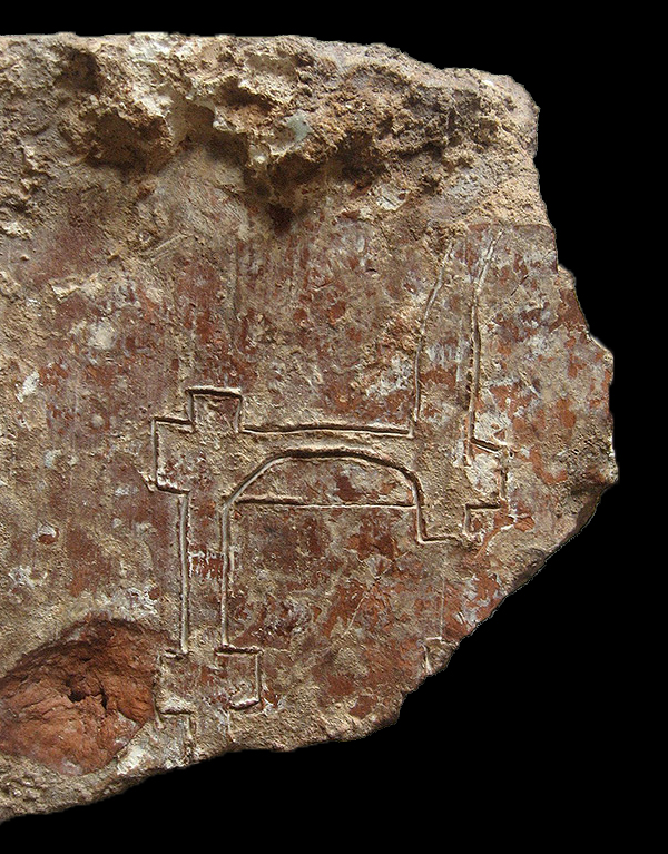 Плінфа з чарцяжом храма-пахавальні ў Полацку (канец XI — пачатак XII ст.)